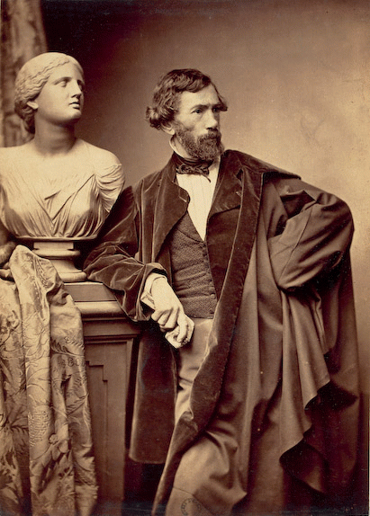 Le sculpteur François Jouffroy épreuve sur papier albuminé à partir d'un négatif verre au collodion